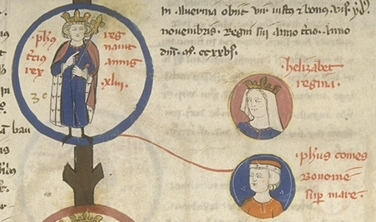 Bernard Gui, De origine prima Francorum